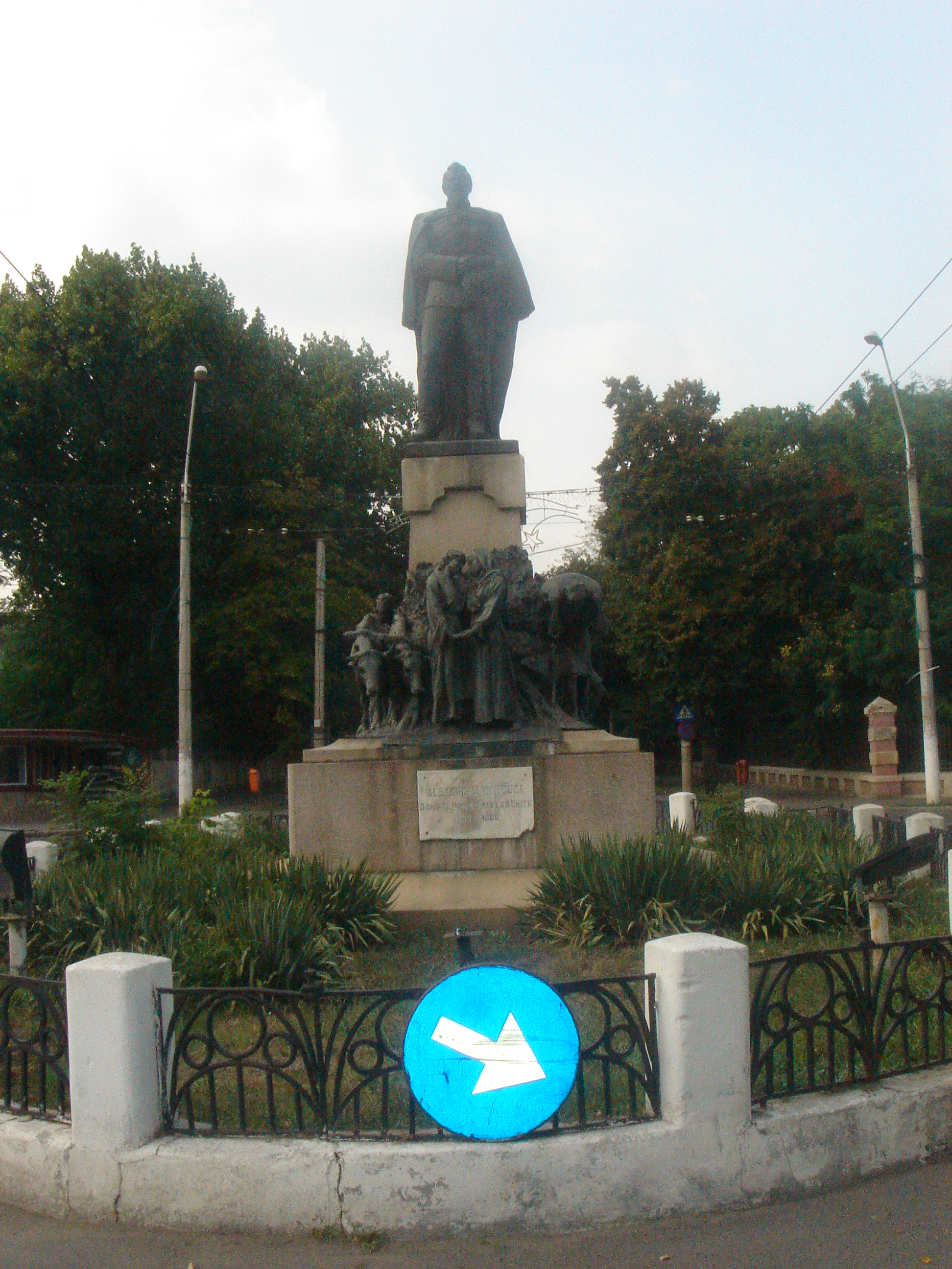 Aflat în rondoul din fața Grădinii Publice, vegheaza de mult timp asupra soferilor ce se plimba pe Str. Domneasca. Aici au loc manifestarile de Ziua Micii Uniri, 24 ianuarie.